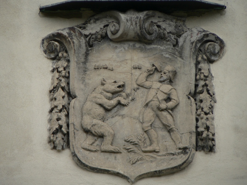 Staré Město pod Sněžníkem, znak na budově radnice